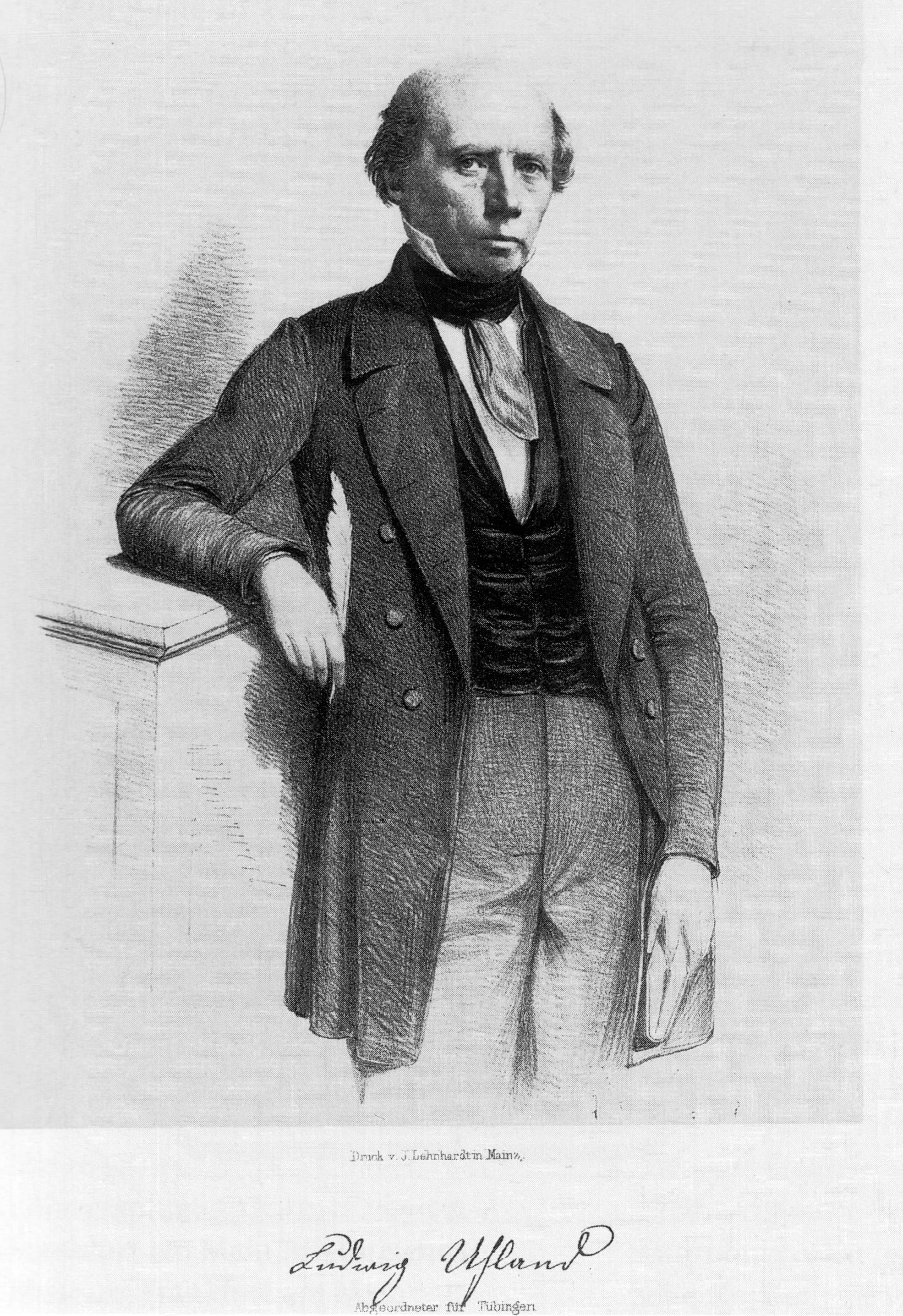 Lithographie, Philipp Winterwerb, 1848. Ludwig Uhland, Abgeordneter der Frankfurter Nationalversammlung